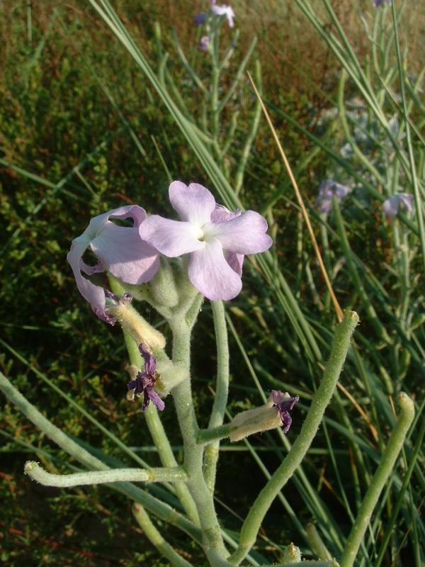 Giroflée des sables, Talmont-Saint-Hilaire.